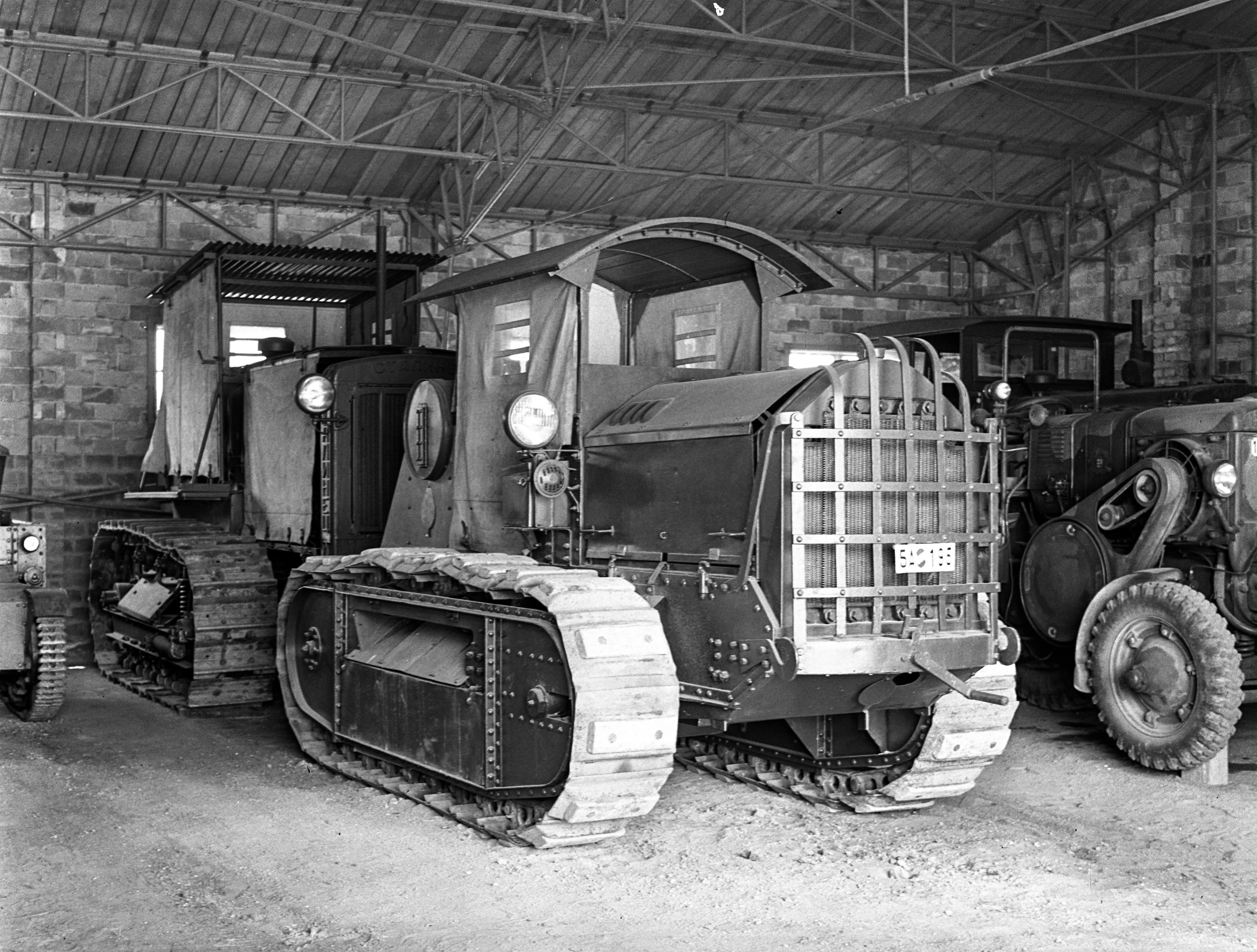 Mátyásföld, Újszász utca 41-43. Magyar Királyi Honvéd gépkocsiszertár, előtérben Hanomag Z50 típusú lánctalpas traktor, mellette Hofherr-Schrantz-Clayton-Shuttleworth KV-40 típusú traktor. Location: Hungary, Budapest XVI. Tags: tractor, tow truck, Gerrman brand, Hanomag-brand, track, H.S.C.S-brand, Hungarian brand, military, Budapest Title: Mátyásföld, Újszász utca 41-43. Magyar Királyi Honvéd gépkocsiszertár, előtérben Hanomag Z50 típusú lánctalpas traktor, mellette Hofherr-Schrantz-Clayton-Shuttleworth KV-40 típusú traktor.